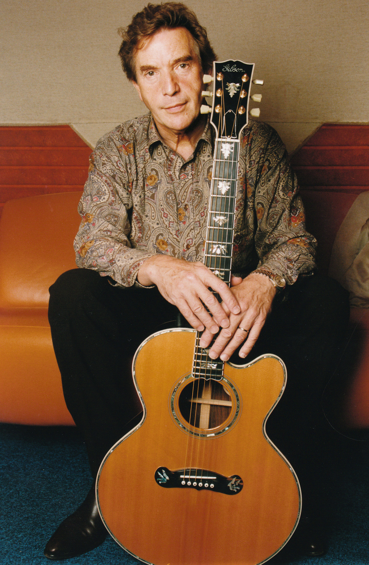 Will Tura, Vlaams charme-zanger.